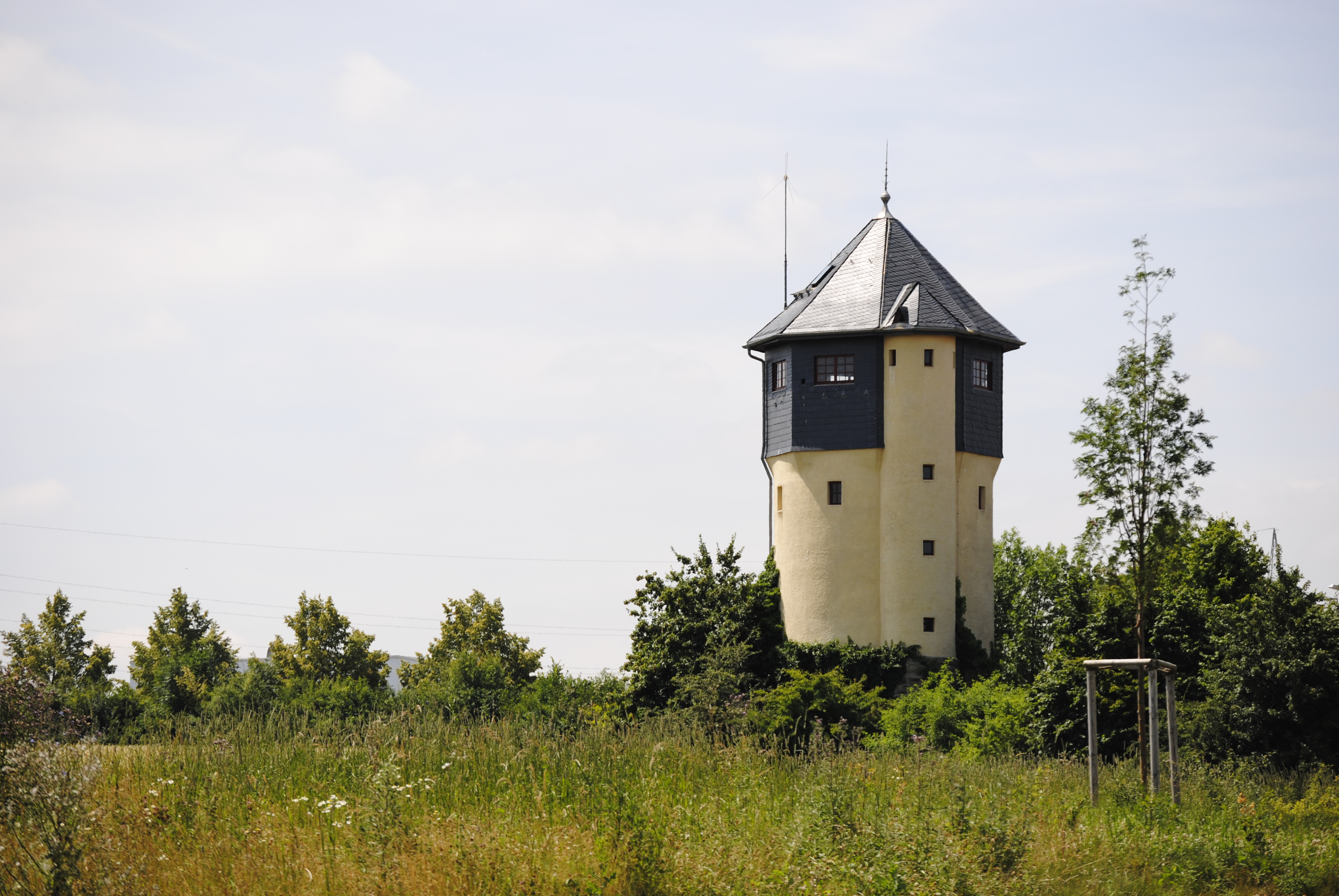 Der Wassertrum in Bad Soden am Taunus